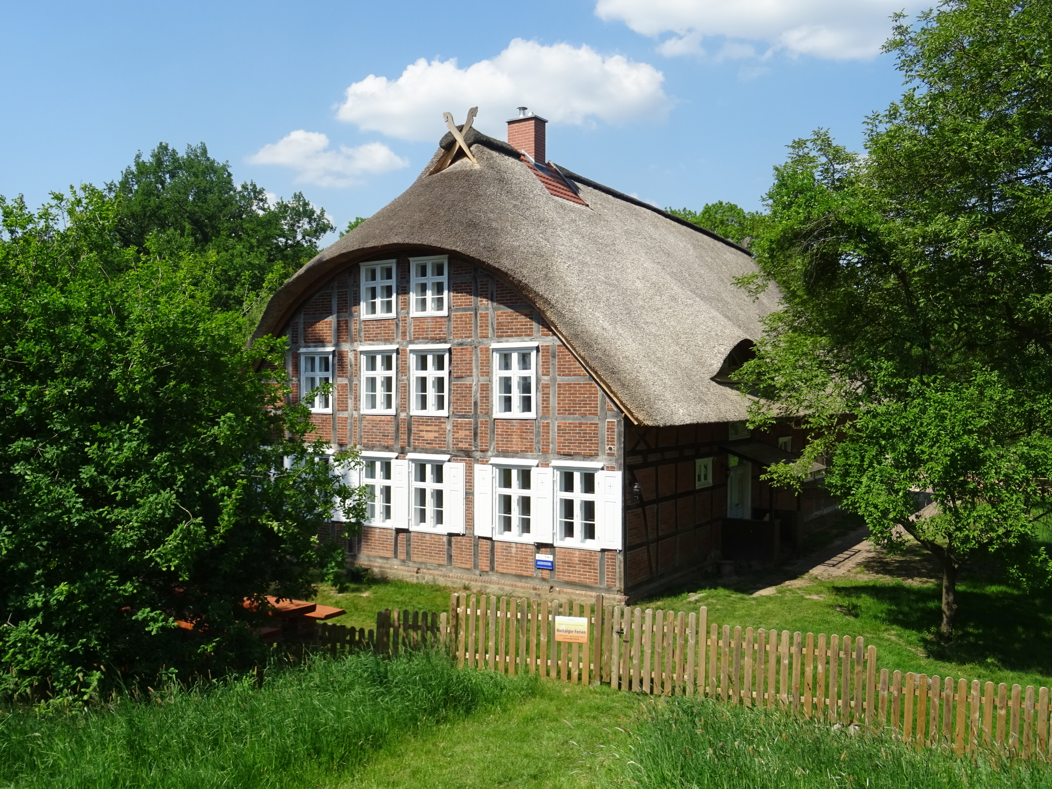 Mödlich, denkmalgeschützter Bauernhof Lenzener Straße 12